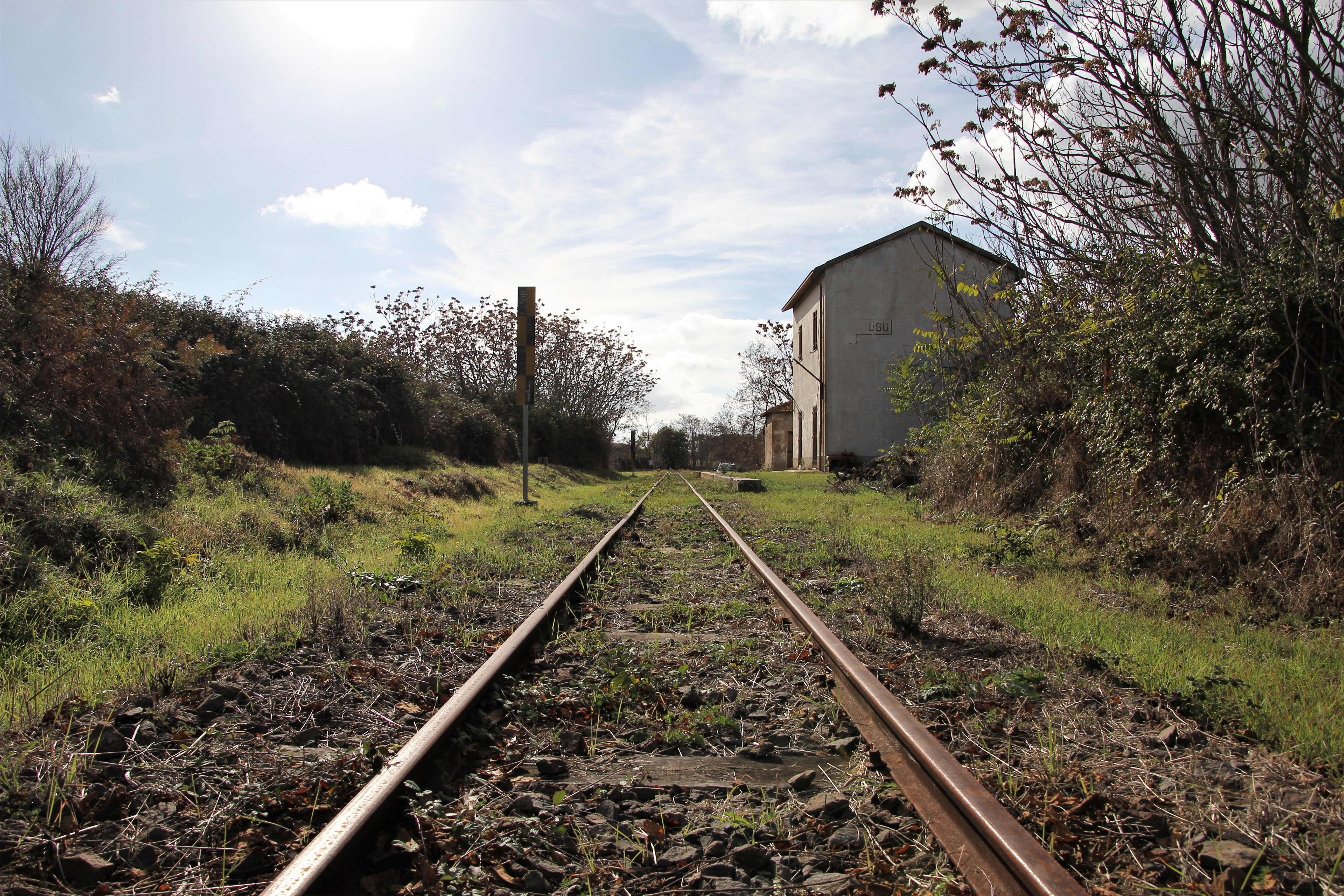 Ploaghe, stazione ferroviaria di Fenosu